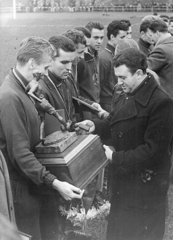 Zentralbild-Zastrow-Löwe Wen-Qu 6.12.1959 120 Minuten ohne Entscheidung - Im Dresdener Heinz-Steyer-Stadion endete das Fußballendspiel um den FDGB-Pokal am 6.12.1959 zwischen dem deutschen Fußballmeister SC Wismut Karl-Marx-Stadt und dem SC Dynamo Berlin 0:0. UBz. Vor dem Endspiel um den FDGB-Pokal wurde dem SC-Wismut Karl-Marx-Stadt der Pokal für seinen deutschen Fußballmeister-Titel 1959 überreicht. Bringfried Müller übernahm den Pokal.